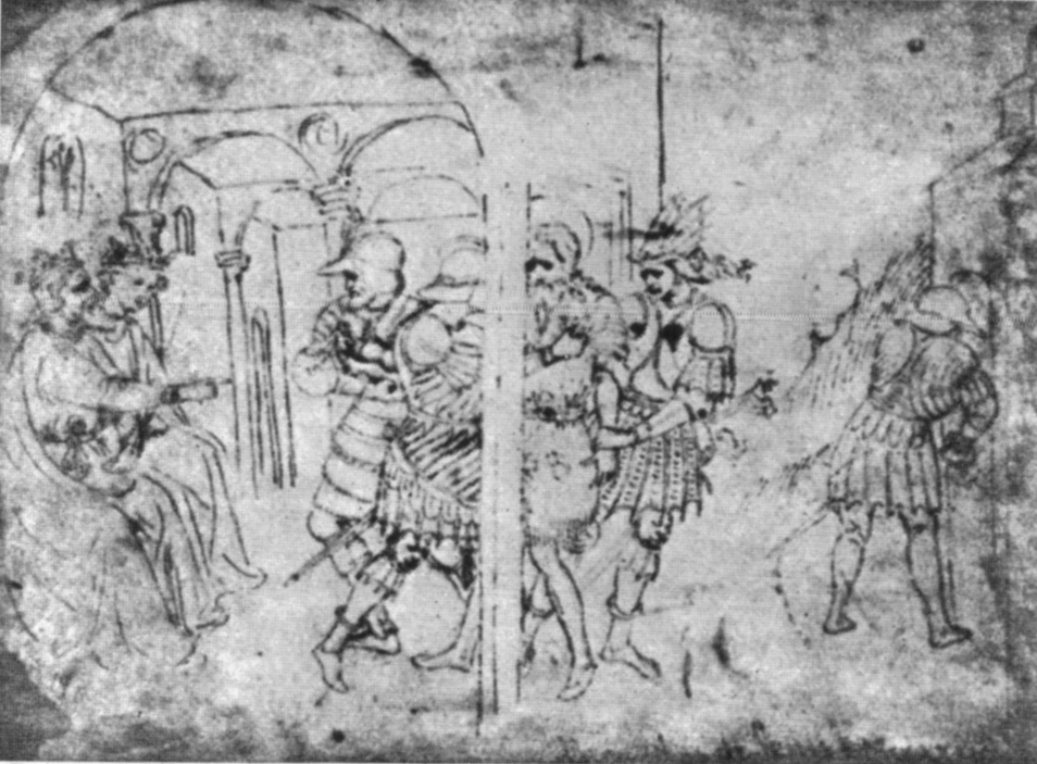 Pisanello, disegni, british museum, 1947.10.11.20